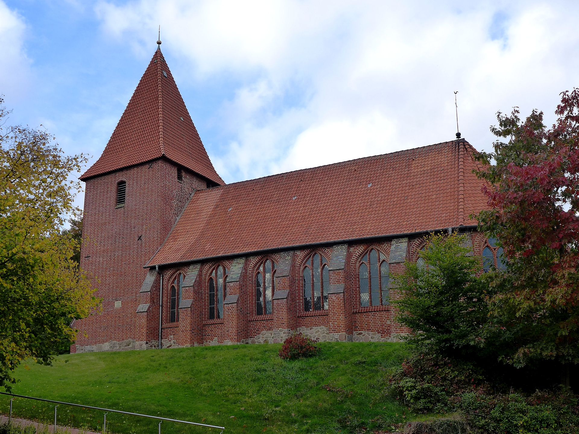 St.-Martins-Kirche in Soderstorf-Raven. Erstmals erwähnt um 1250. Grundmauerreste einer rechteckigen Feldsteinkirche aus der Zeit um 1200. Das heutige Gotteshaus im gotischen Backsteinstil wurde zwischen 1400 und 1425 erbaut. Der Turm wird auf das Jahr 1600 datiert.